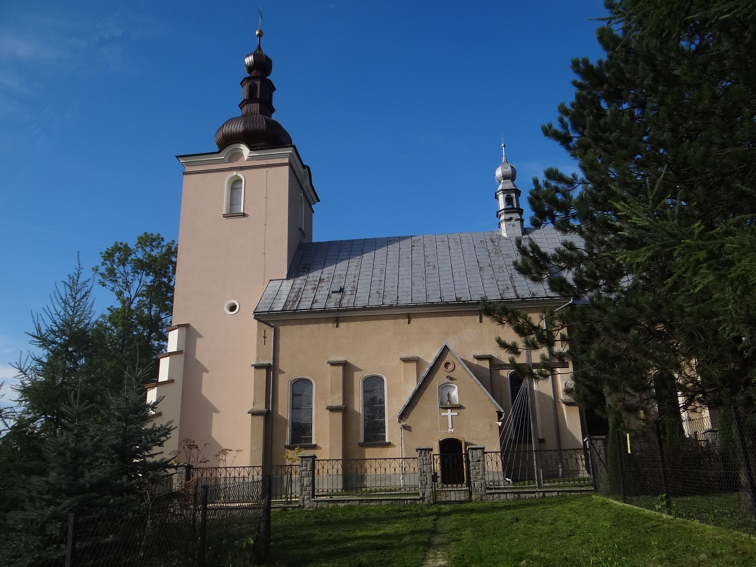 Kościół w Klikuszowej